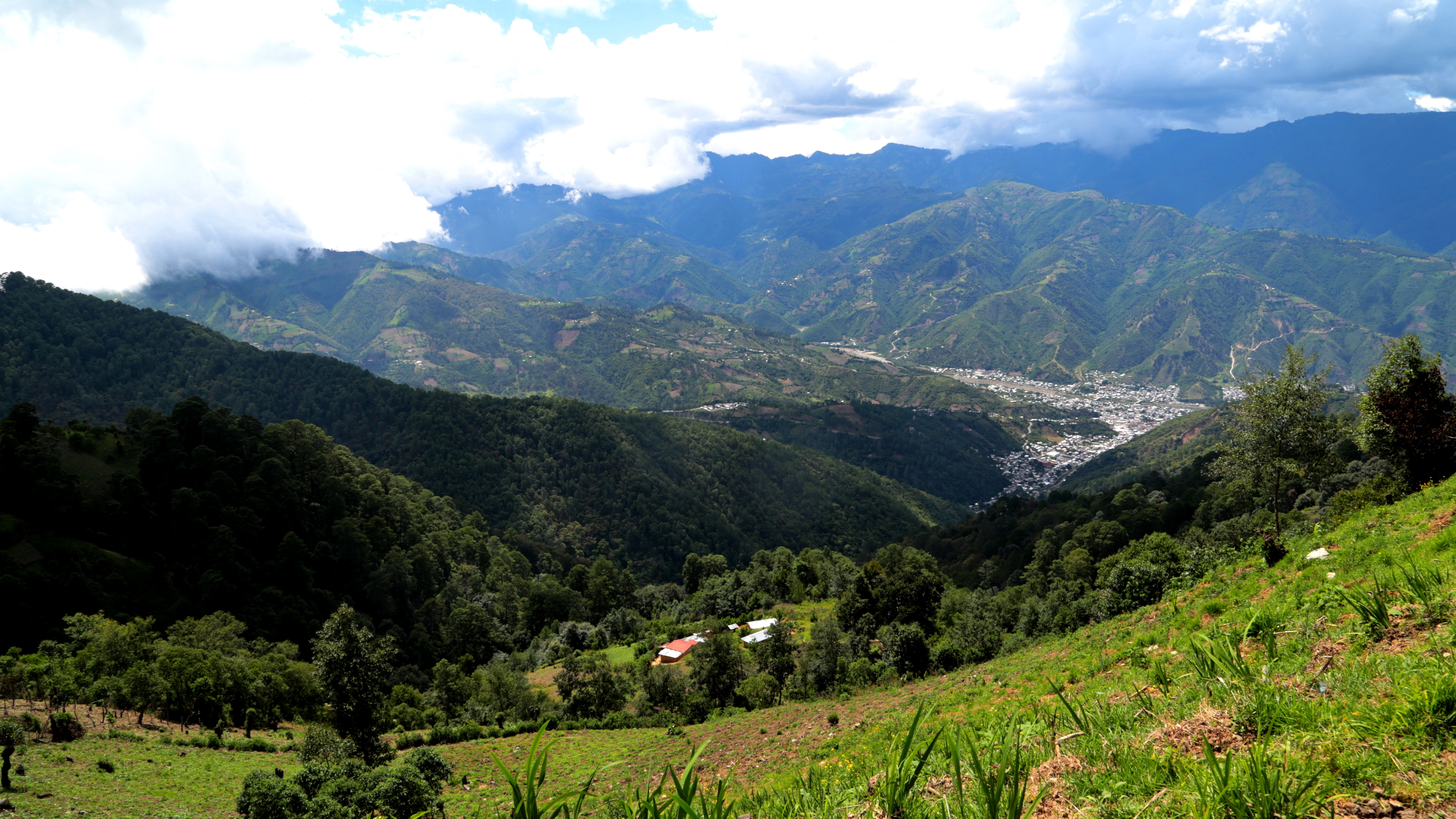 Motozintla Chiapas